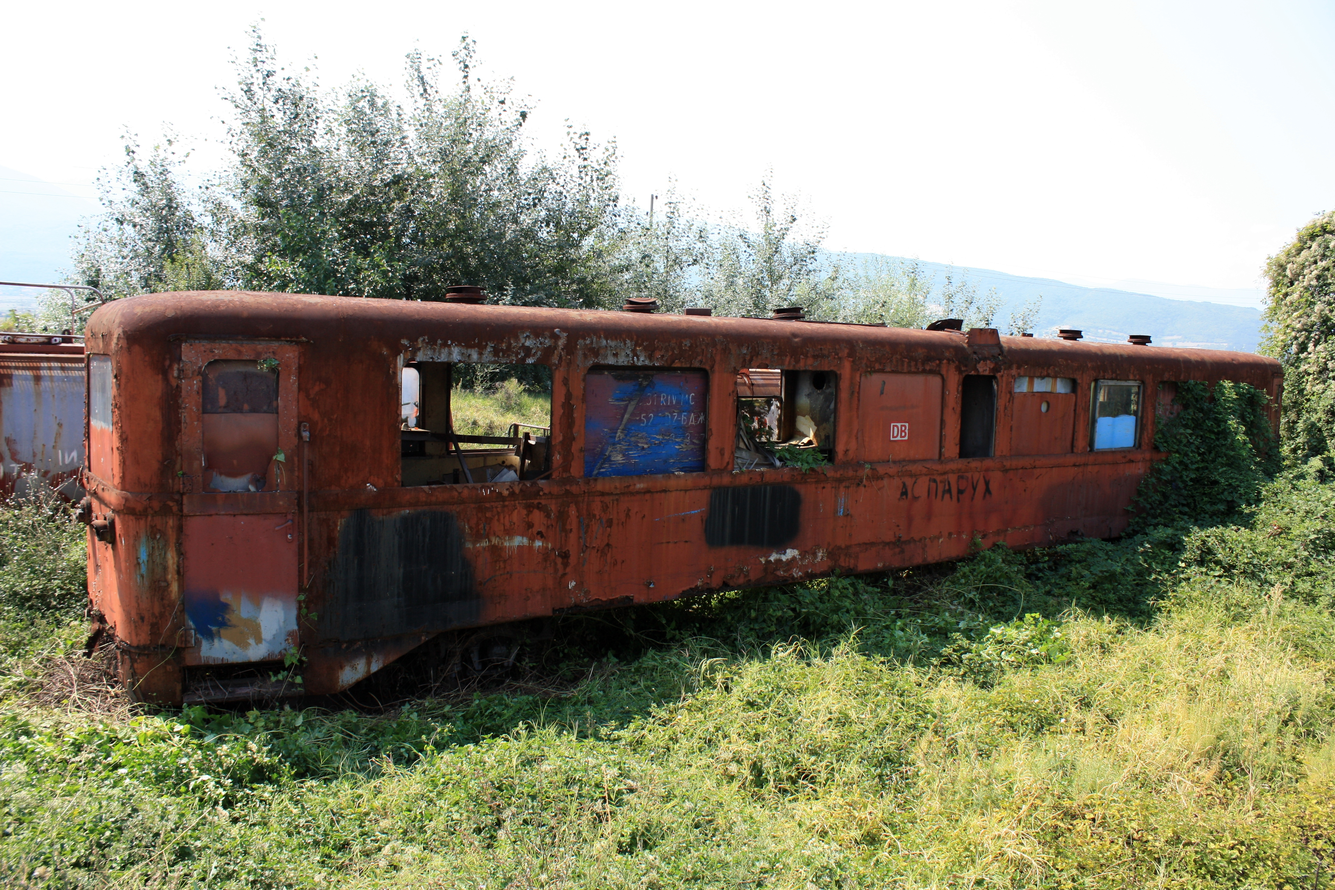 Beiwagen Baureihe 181 oder 182 von der Schmalspurlokomotive Baureihe 81 oder 82 des Herstellers Ganz aus Budapest. Abgestellt in Septemwri auf den Gleisen der Schmalspurstrecke der Rhodopenbahn (Spurweite 760 mm), welche zur Bulgarischen Staatseisenbahn (BDŽ) gehört. Die Aufnahme entstand in Bulgarien am 30. Juli 2015 auf den Abstellgleisen hinter den Instandsetzungshallen. IMG 9848